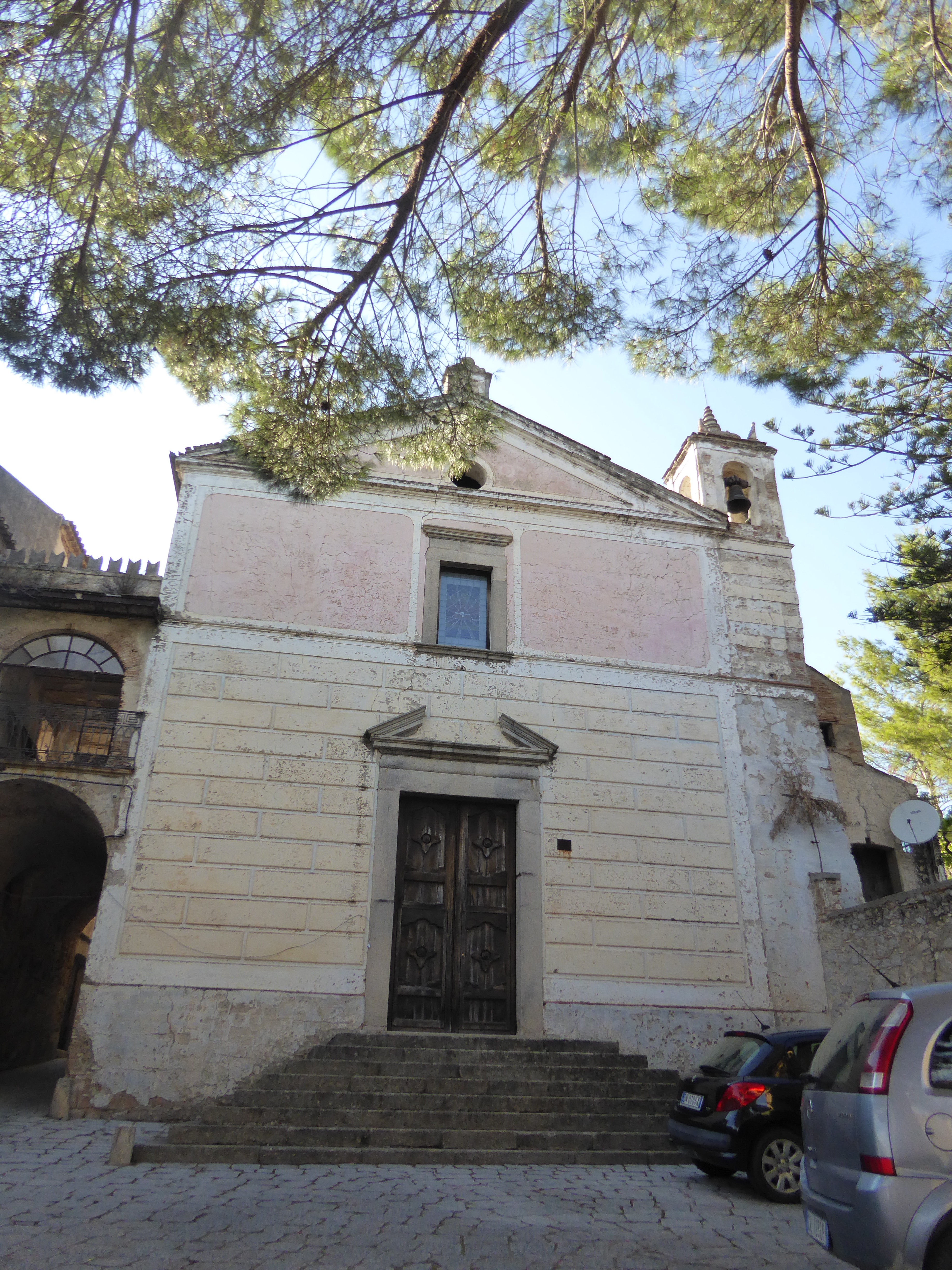 Chiesa dello Spirito Santo a Riace (2018)